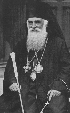 Патриарх Румынский Мирон (Кристя)